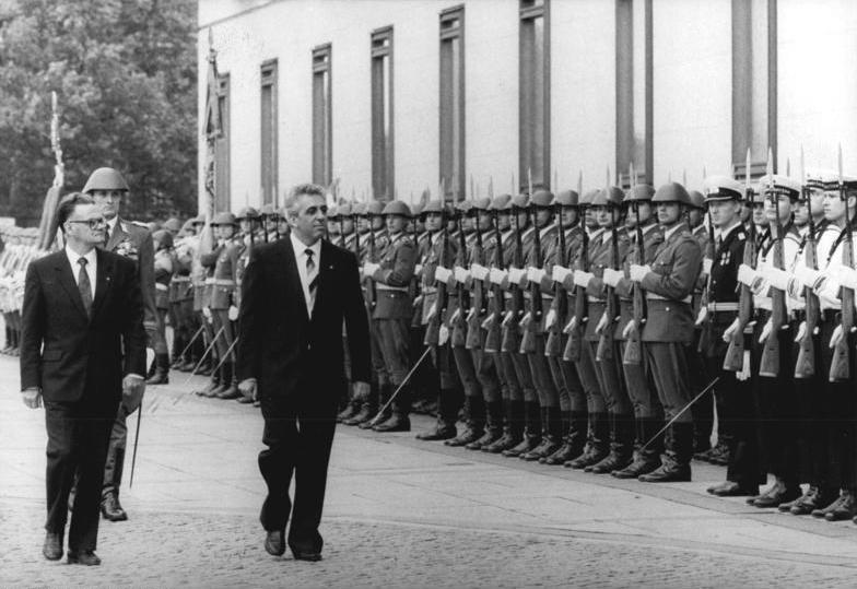 ADN-ZB Zimmermann 24.10.89 wü Berlin: Zeremoniell Vor dem Sitz des Staatsrates am Marx-Engels-Platz wurde der neue Vorsitzende des Staatsrates der DDR, Egon Krenz, Generalsekretär des ZK der SED, zu seinem offiziellen Amtsantritt mit militärischen Ehren begrüßt. An seiner Seite Heinz Eichler, Sekretär des Staatsrates.